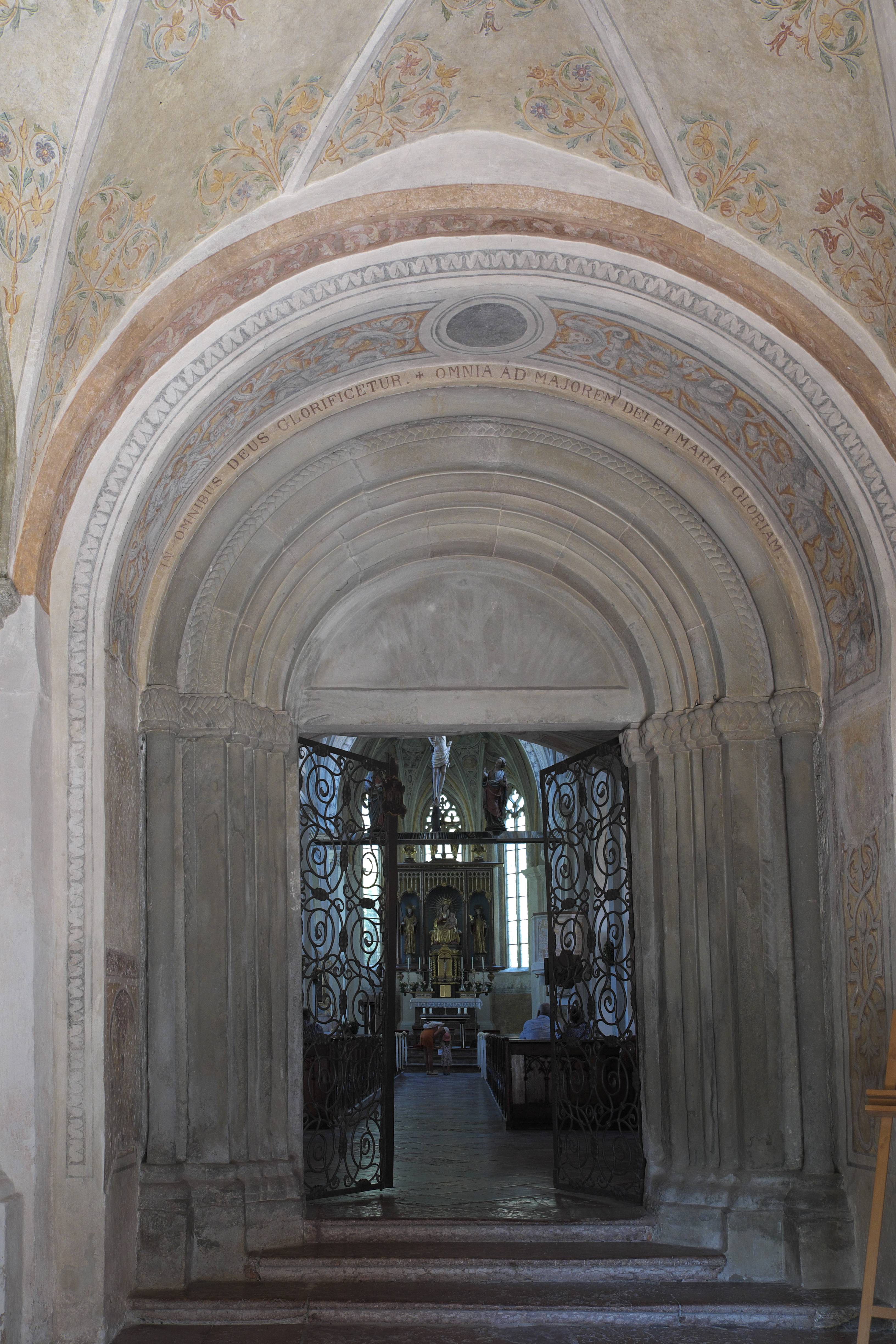 Katholische Pfarrkirche, ehemalige Benediktinerklosterkirche St. Lambert in Klosterseeon, einem Ortsteil von Seeon-Seebruck im Landkreis Traunstein (Bayern/Deutschland), Romanisches Portal